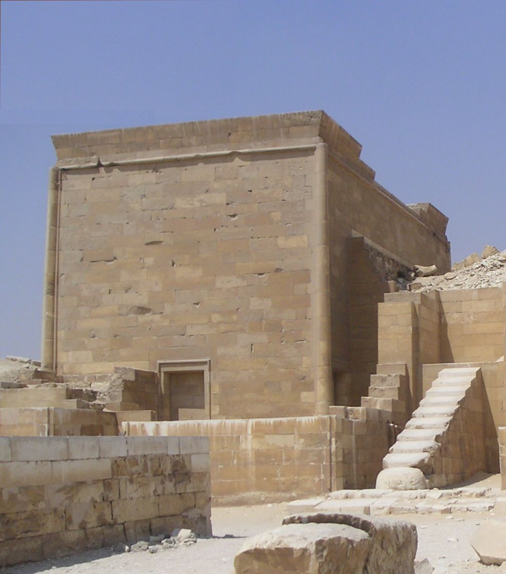 Heb-Sed Kapelle vom Seh-netjer-Typ (Gottesschatten-Typ) auf dem Komplex der Djoser-Pyramide